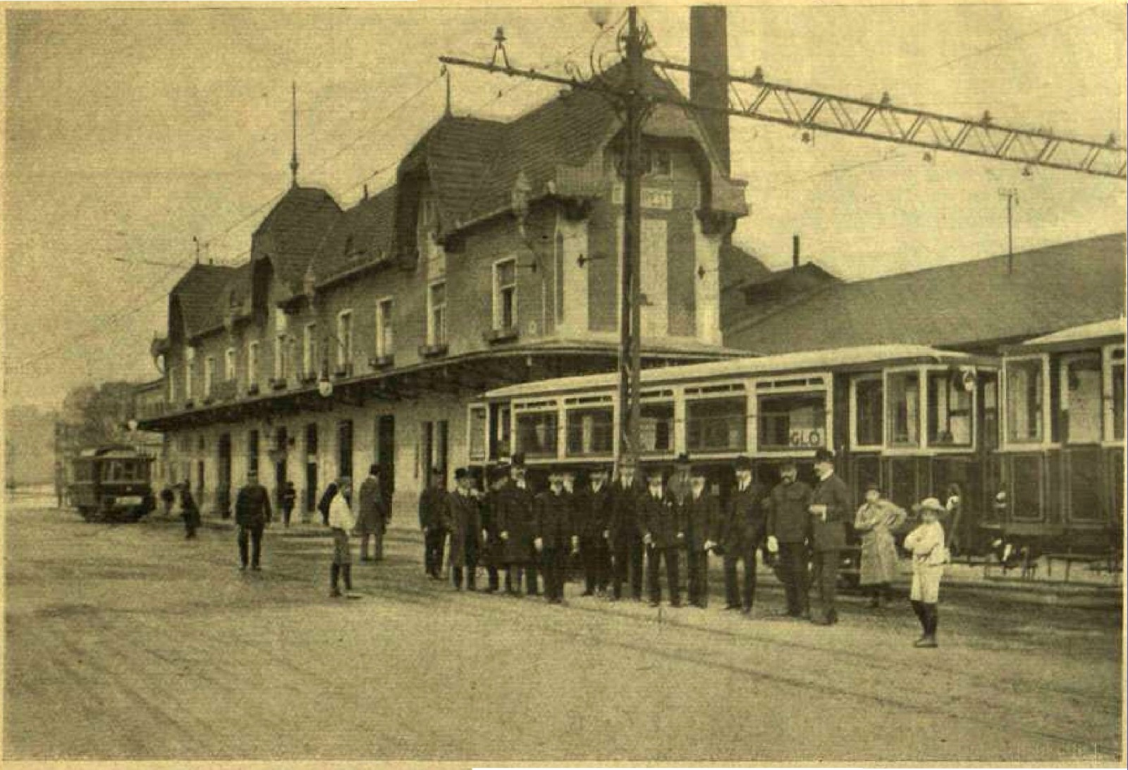 A gödöllői HÉV végállomása a Keleti pályaudvarnál 1911-ben